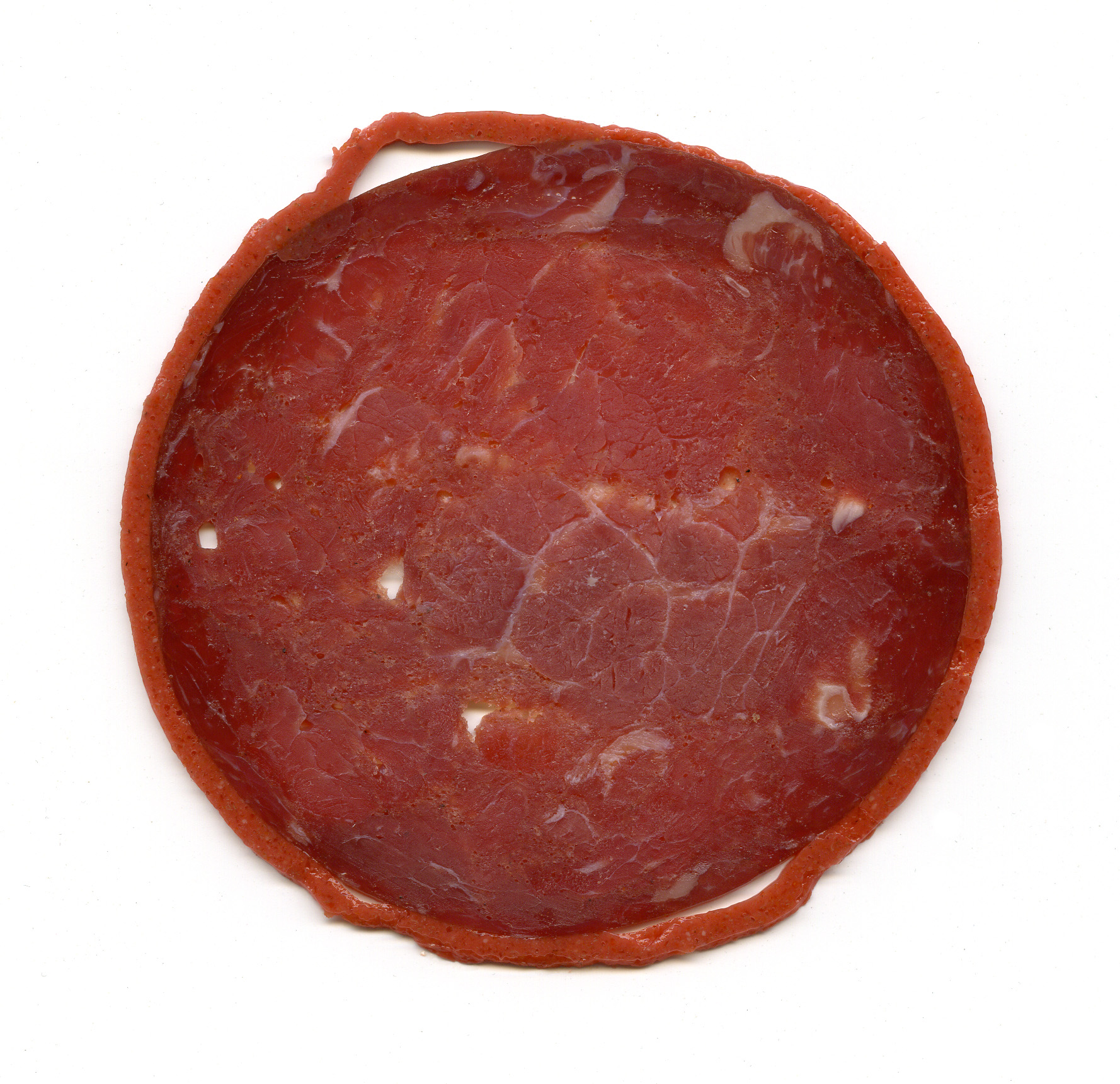 Industriell hergestellte Pastırma aus zusammengefügten Fleischstücken